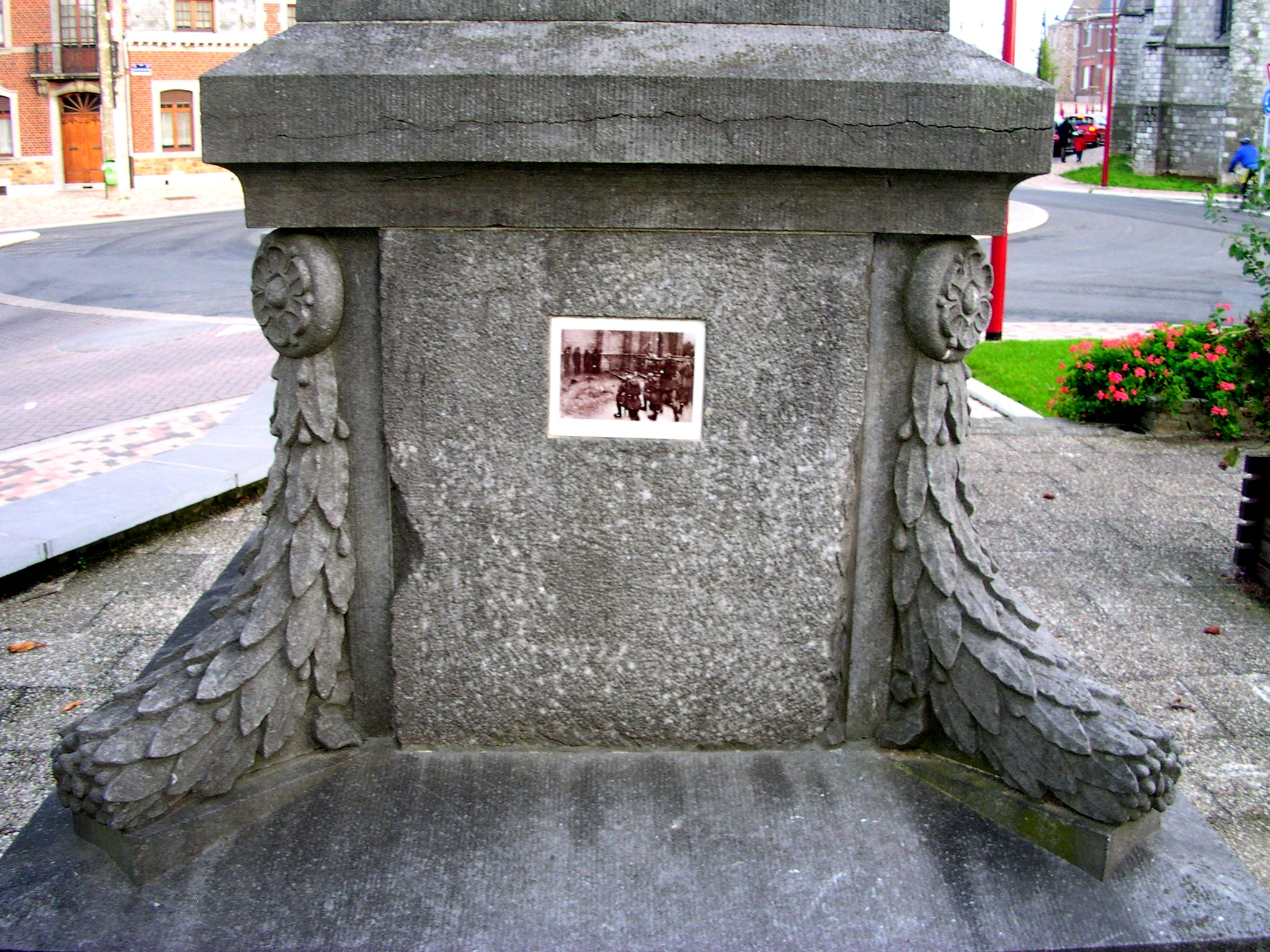 Denkmal für die Opfer des 1. Weltkriegs in Blegny bei Lüttich